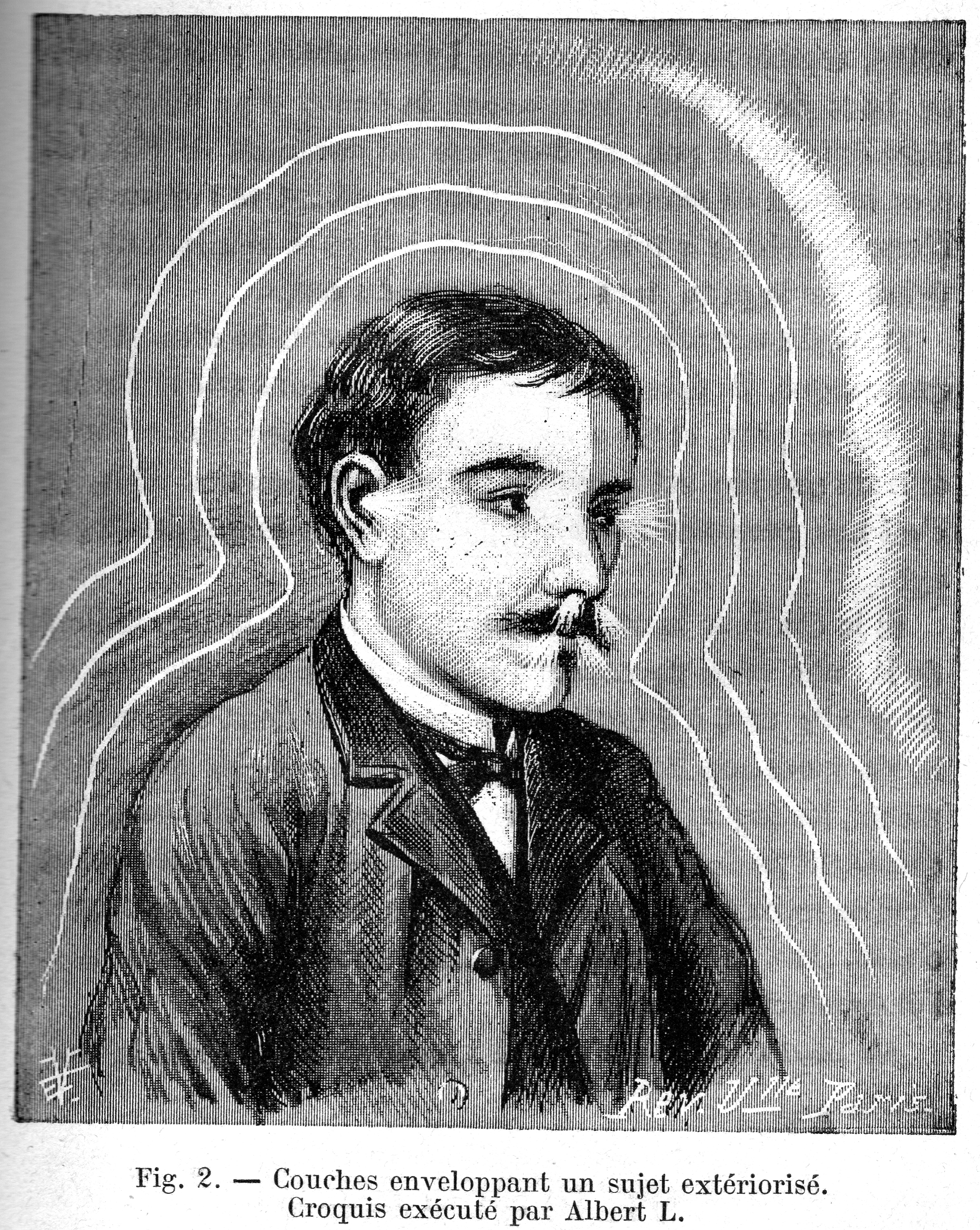 Illustration du livre "Extériorisation de la sensibilité" d'Albert de Rochas, Paris, 1899. Dessin représentant un sujet "médium".